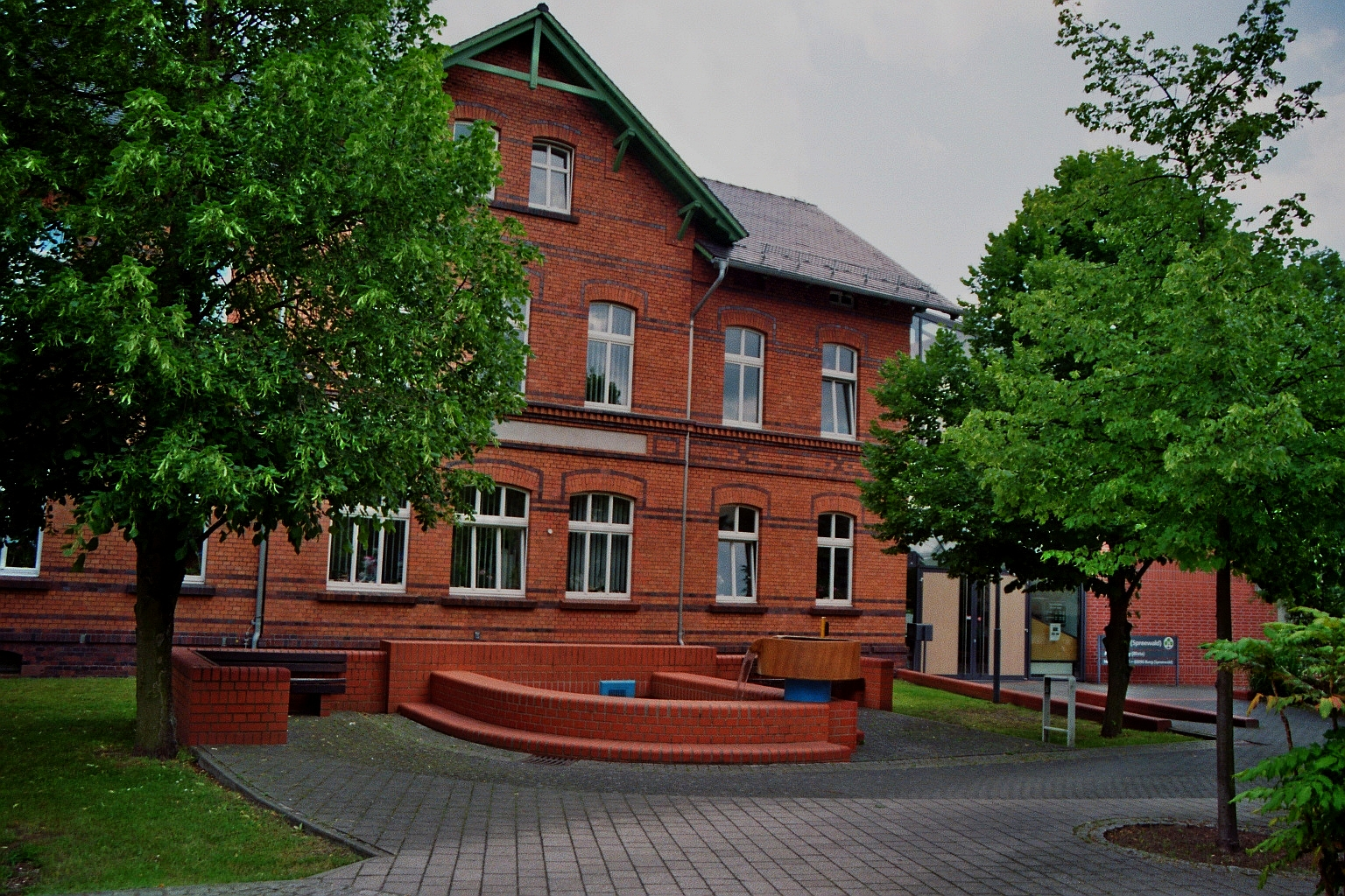 Amt Burg (Spreewald) – Gebäude der Amtsverwaltung – in Burg (Spreewald), Landkreis Spree-Neiße, Brandenburg, Deutschland.